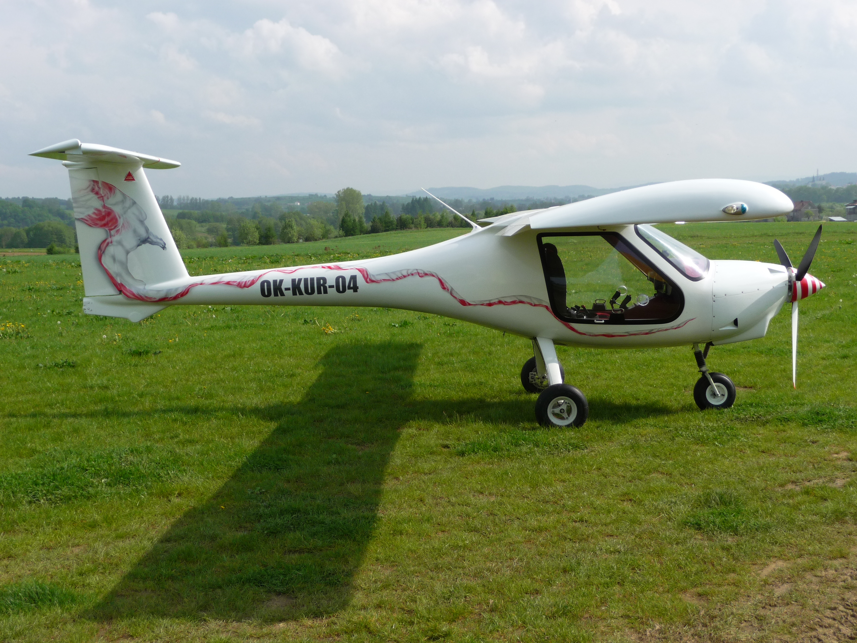 Dwumiejscowy samolot ultralekki GP-5, zaprojektowany przez Grzegorza Peszke